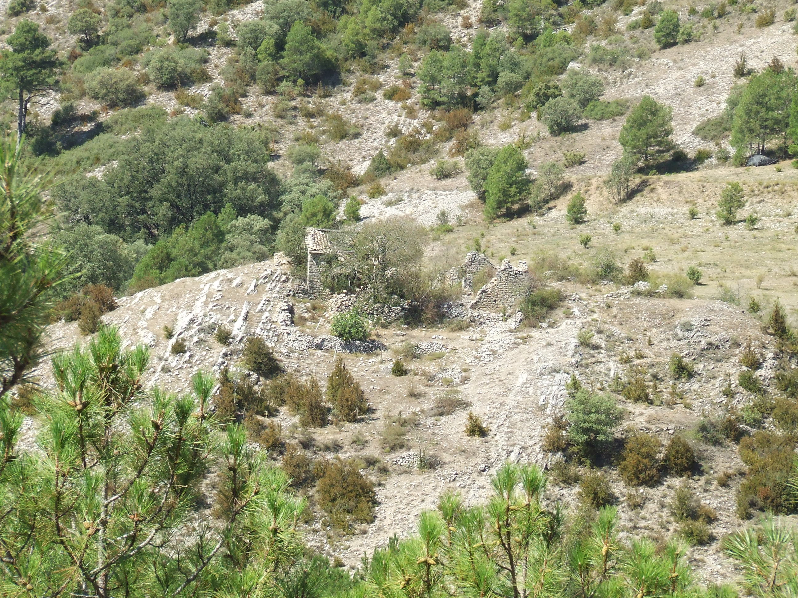 La Casa Fontanet (Abella de la Conca, Pallars Jussà)